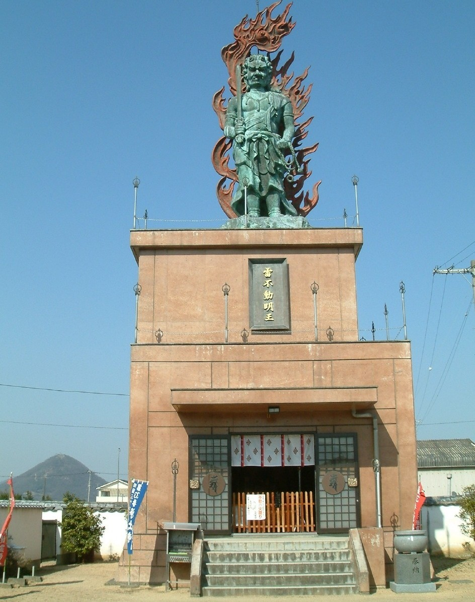 浄土寺の不動堂